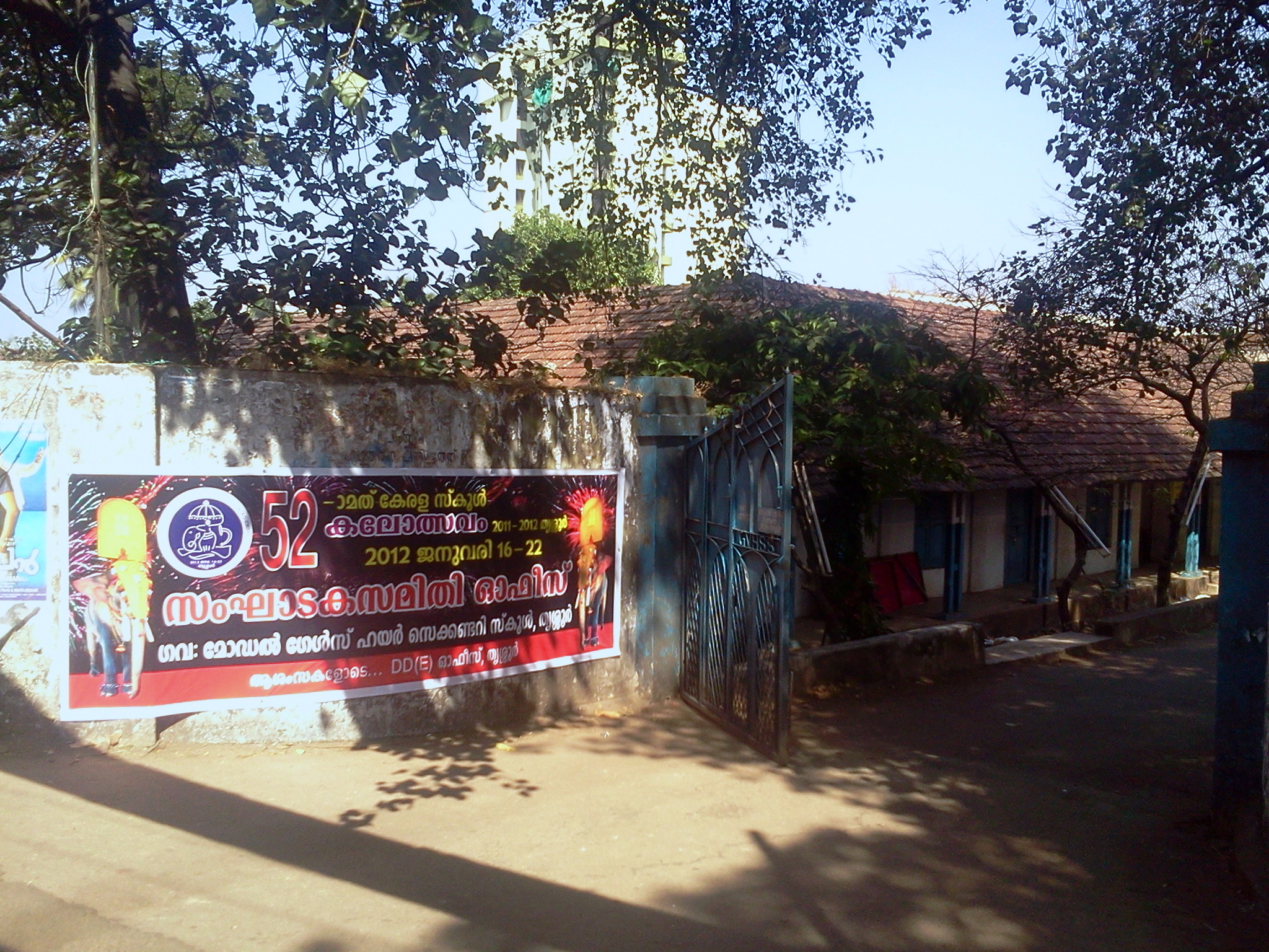 മോഡല്‍ ഗേള്‍സ് , മുന്‍വശം കേരളത്തിന്റെ അമ്പത്തി രണ്ടാമത് സ്കൂൾ കലോത്സവം 2012 ജനുവരി 16 മുതൽ ജനുവരി 22 വരെ തൃശ്ശൂരിൽ നടത്തുന്നു. കേരളത്തിലെ സ്കൂൾ വിദ്യാർത്ഥി, വിദ്യാർത്ഥിനികളുടെ സംസ്ഥാനതല കലാമേളയാണ്‌ കേരള സ്കൂൾ കലോത്സവം. എല്ലാവർഷവും ഡിസംബർ-ജനുവരി മാസങ്ങളിലായി നടക്കുന്ന ഈ കലോത്സവം ആരംഭിച്ചത് 1956-ൽ ആണ്.